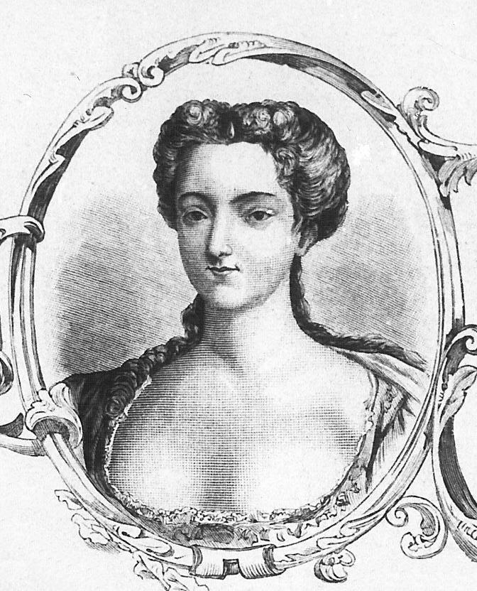 Constance Jauch (1722-1802) (retouchierter Rand)